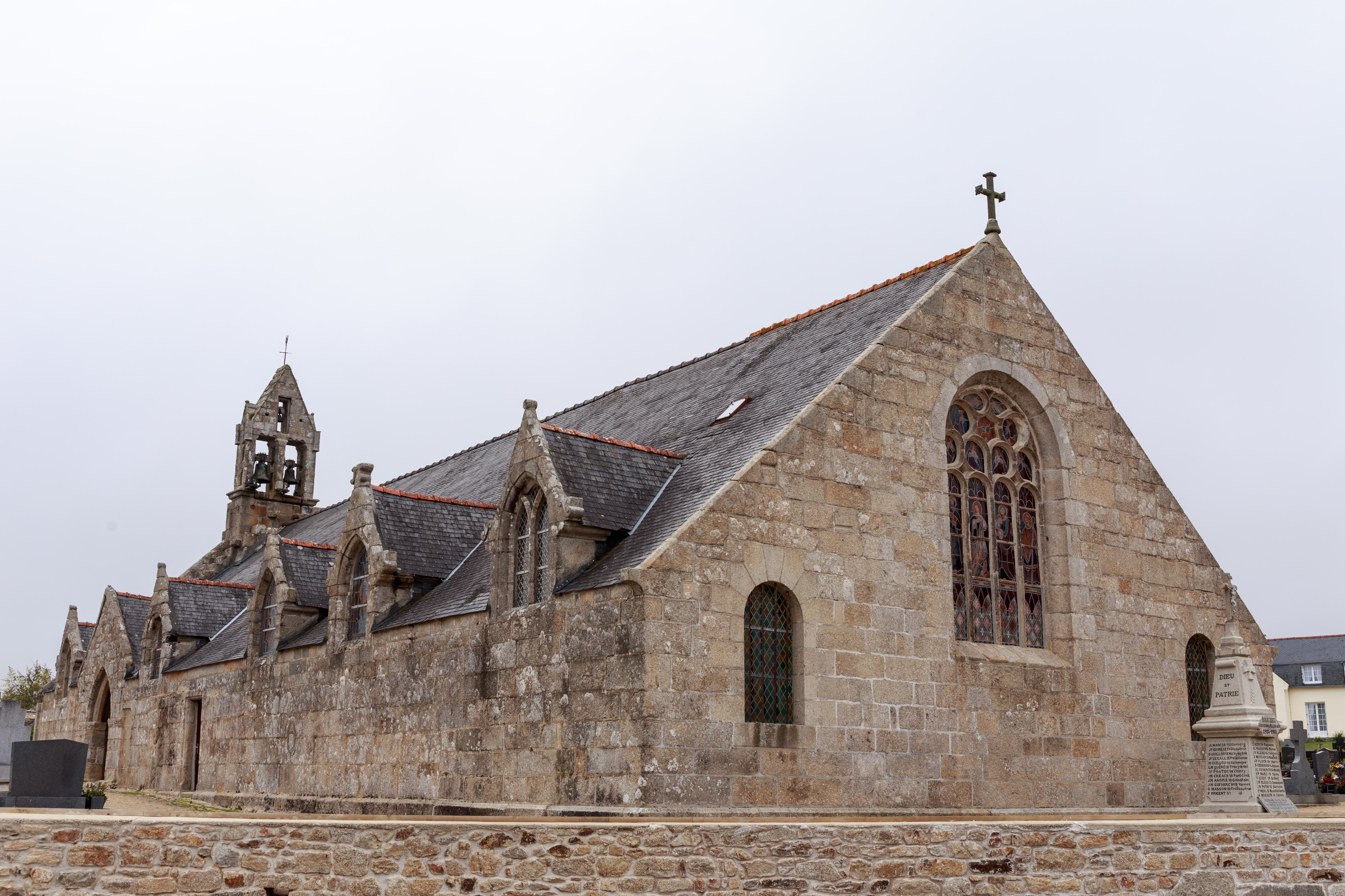 Eglise paroissiale Saint-Léonor à Tréflaouenan (Finistère, Bretagne).